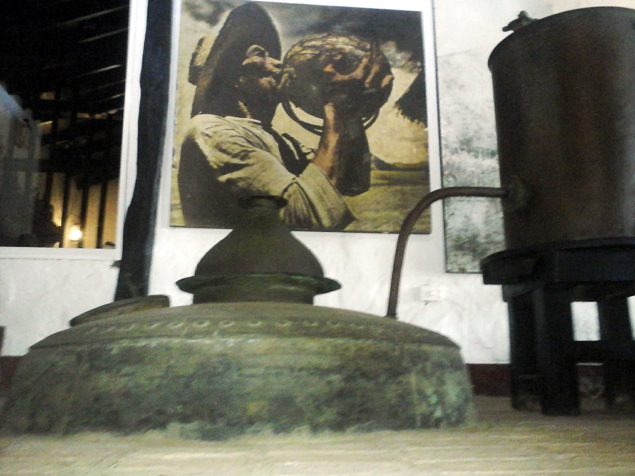 Interior de la Haciencia del Tanque, ubicada en la Isla de Margarita.